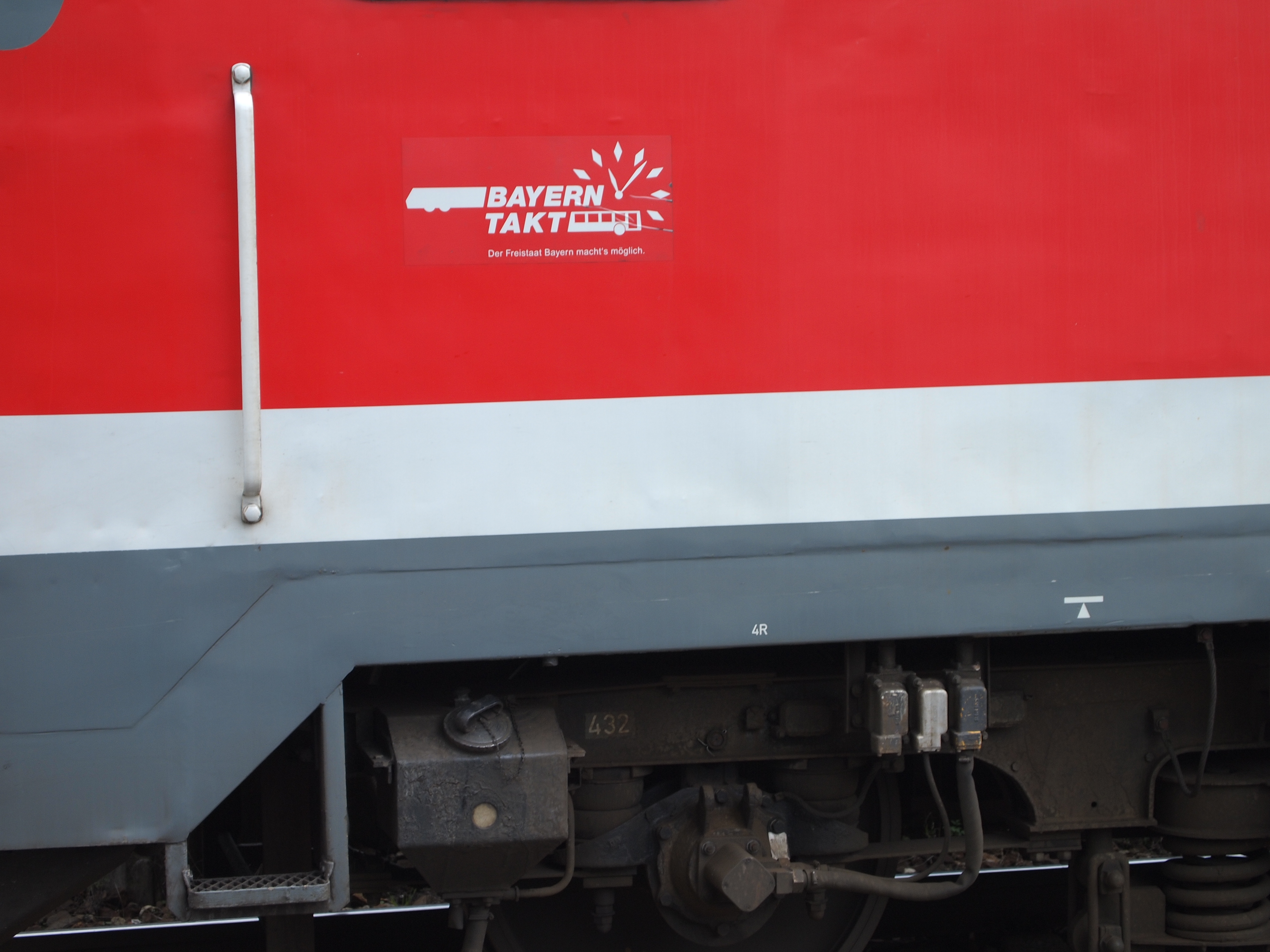 Logo des Bayerntakts, ein ÖPNV-Konzept in Deutschland auf der Regionalbahn 57349 in Kaufbeuren